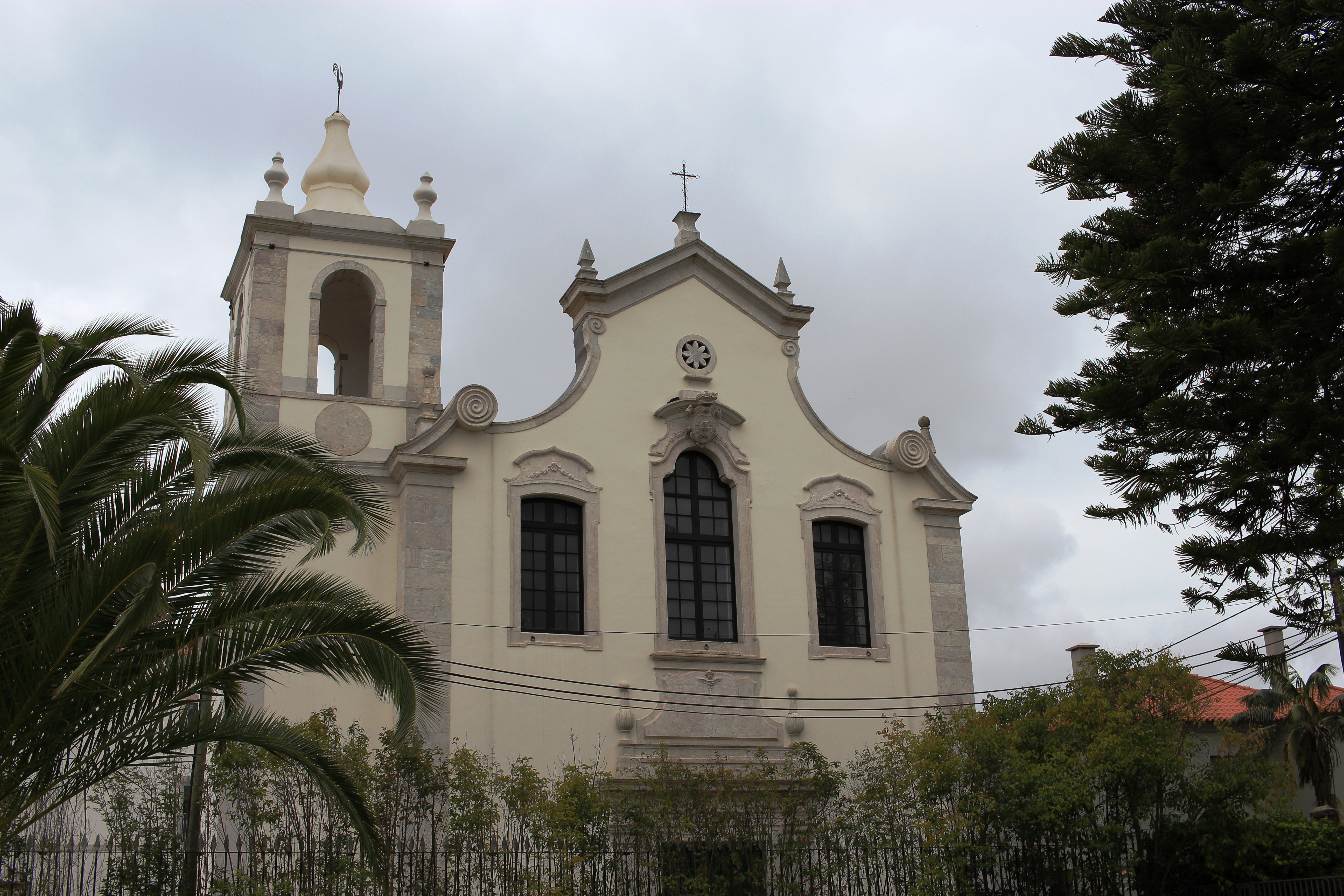 Igreja de Nossa Senhora da Porta do Céu (Telheiras) - Fachada